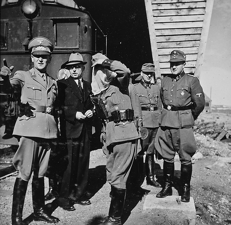 Higher Nazi officials on inspection on Ofoten line. Notice the policeman with mosquito net over his head, he is guarding the border crossing to Sweden. The occasion was a trip through Northern Norway and Finland, as Reichskommissar Josef Terboven undertook in 1942. In the photo seen Johlitz, Horn und Henne.